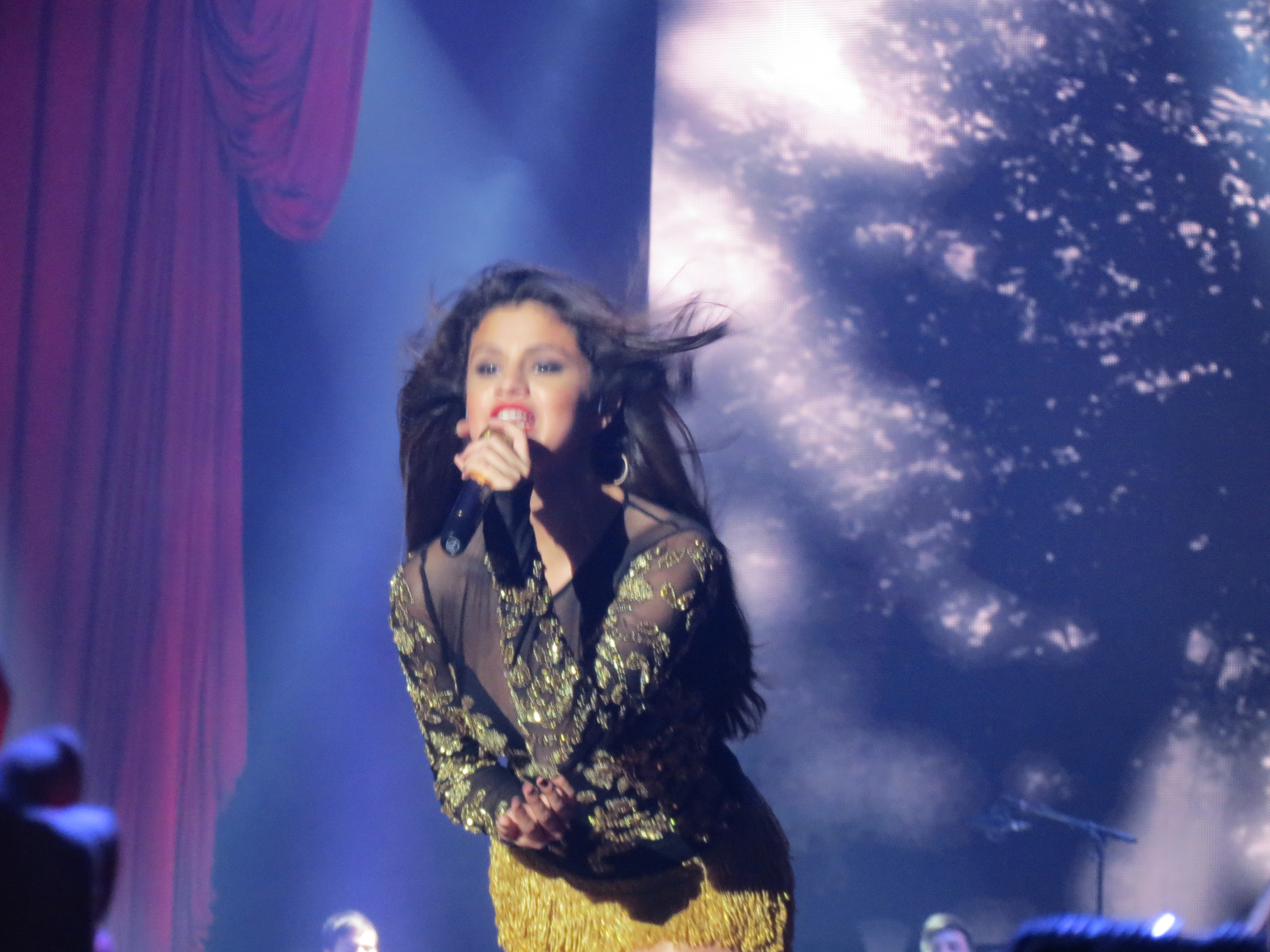 Selena Gomez StarsDance Nov 2013 San Diego, CA